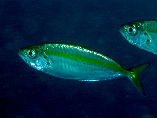 メアジ Selar crumenophthalmus